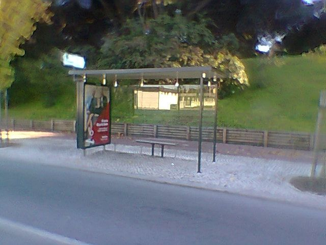 Paragem da R.L. no ponto mais elevado da Av. Brasil, em Lisboa.